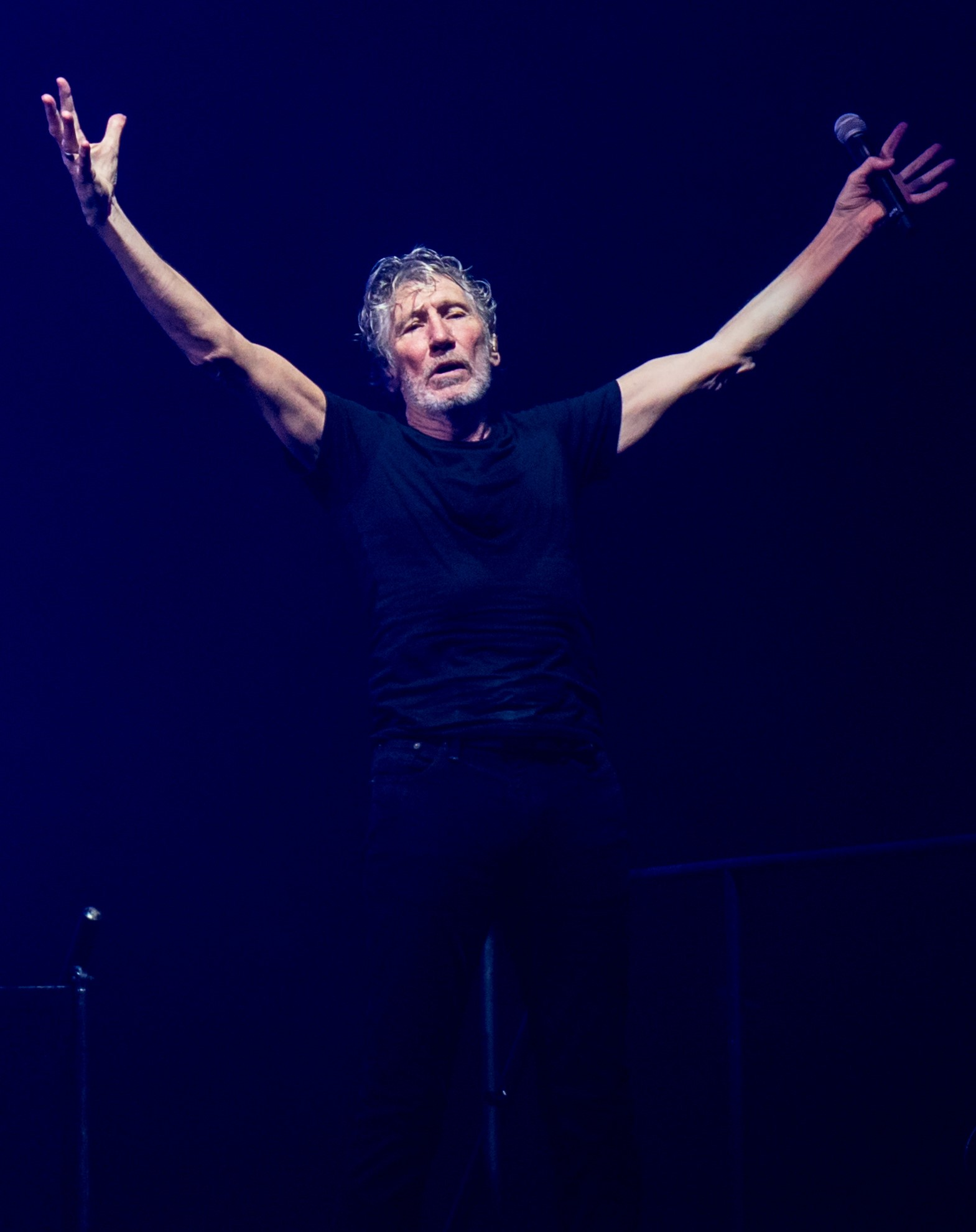 RogerWatersNZ240118-33